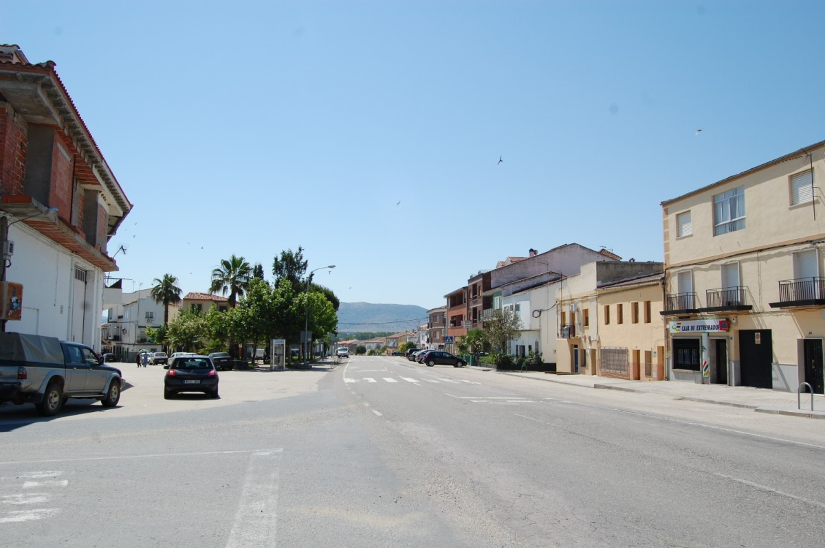 Cruce de la carretera EX-370 con la carretera de Valdeobispo, en Carcaboso, provincia de Cáceres, España.